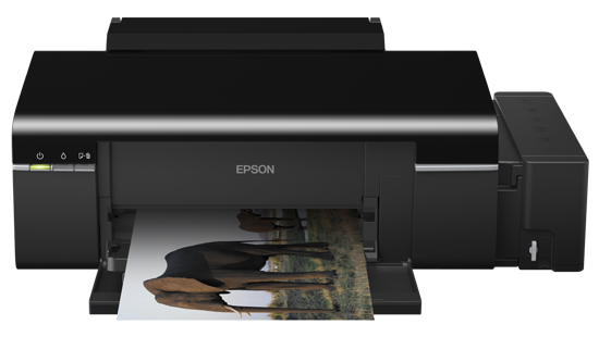 Impresora Epson L800 de Inyeccion de Tinta